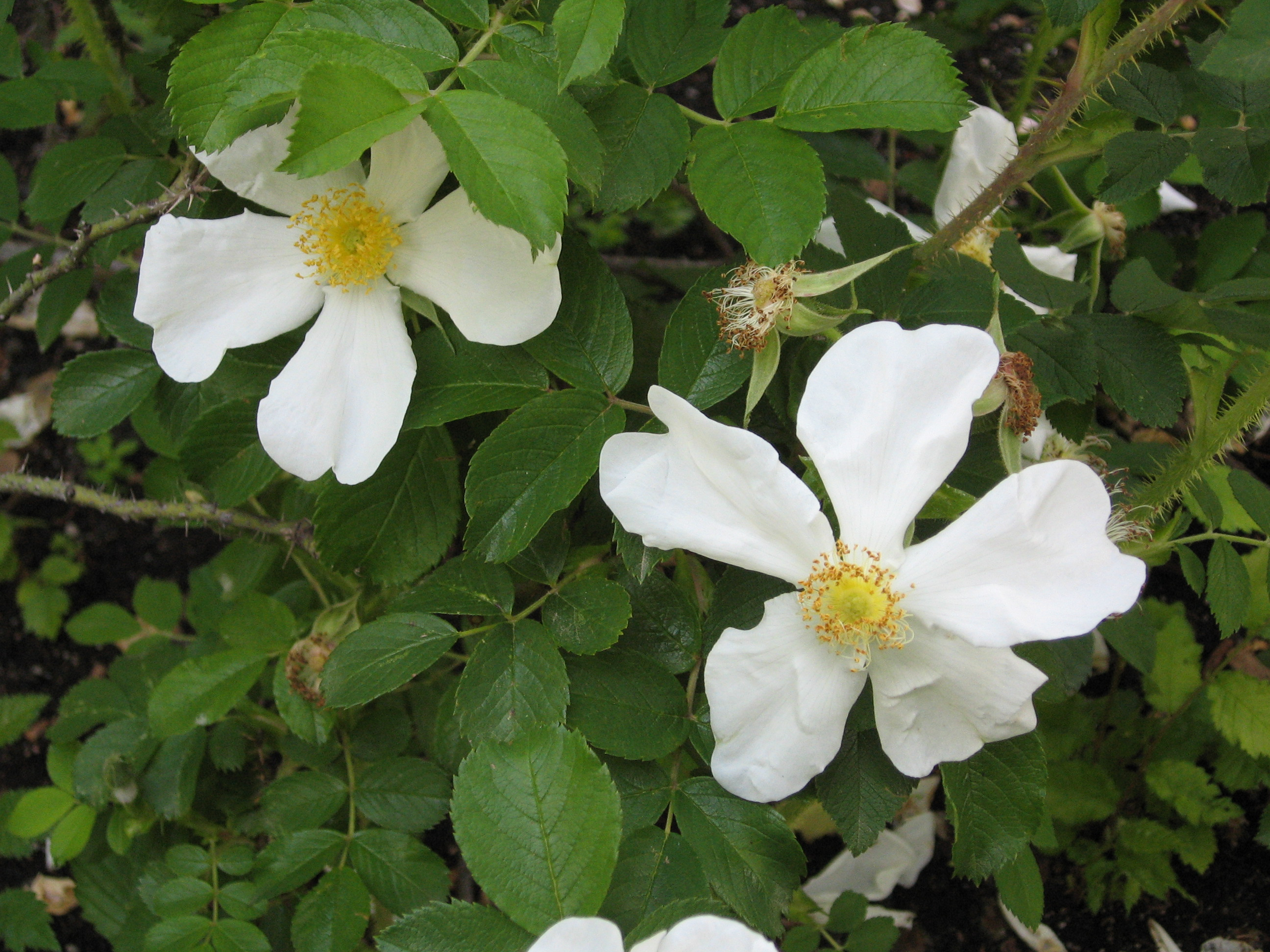 Rosa x paulii. Real Jardín Botánico de Madrid.